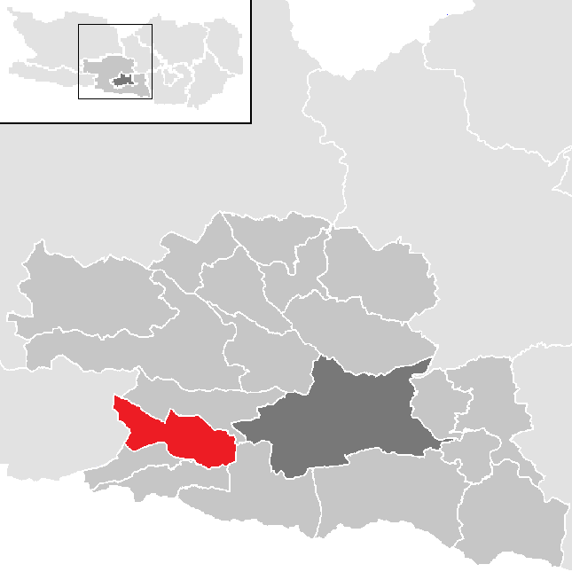 Bezirk Villach-Land